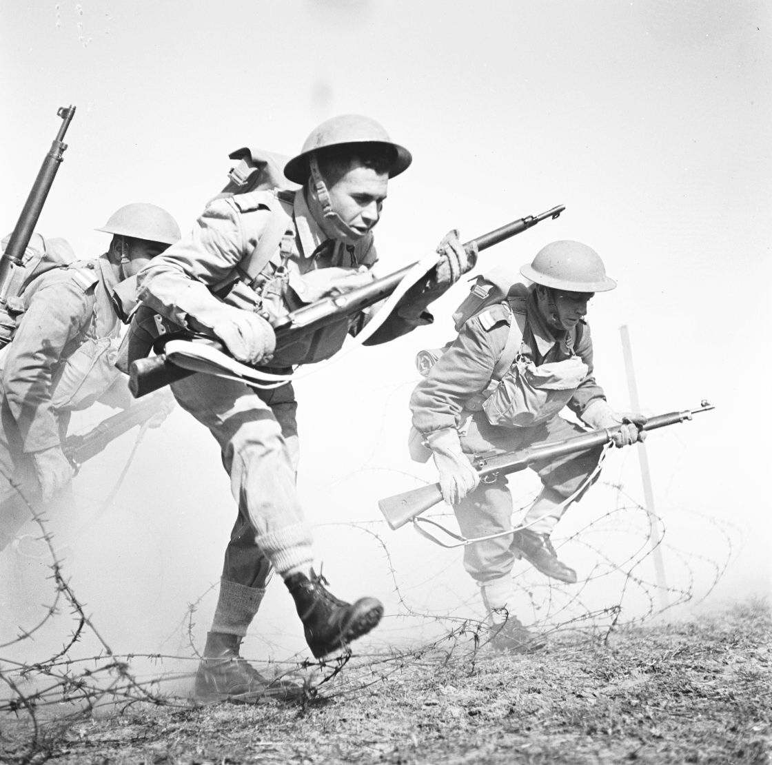 אוסף צילומים של הצלם זולטן קלוגר טווח מספרי התשלילים 17471 - 17584: Palestine Regiment Training Depot בסיס הדרכה למועמדים לקצונה - סרפנד